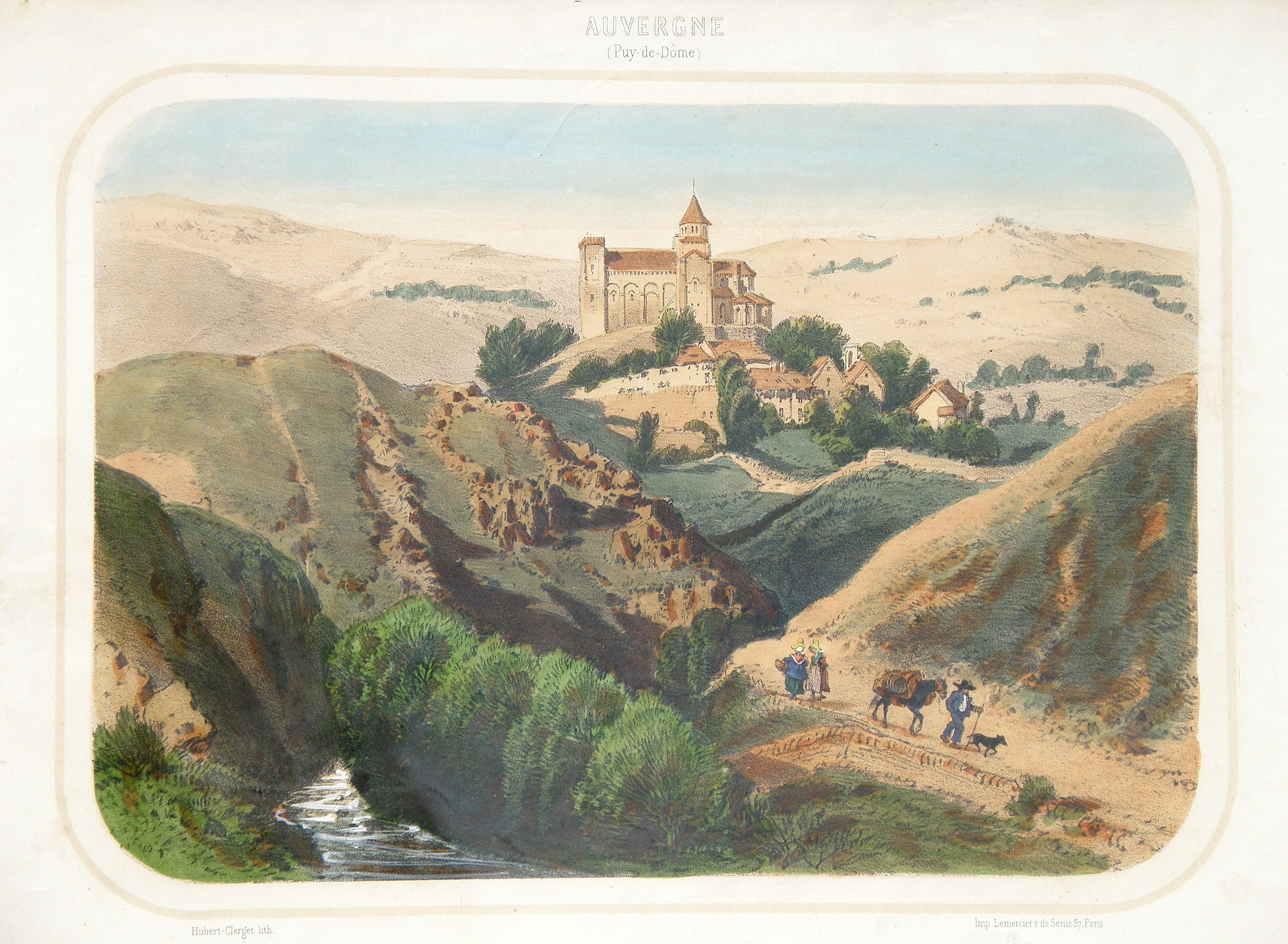 Vue de Saint-Nectaire, dans le Puy-de-Dôme, sur une gravure du XIXe siècle.